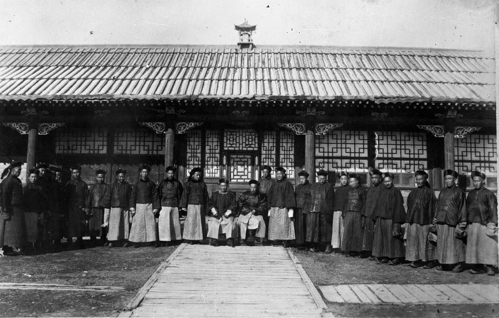 Сандо и его коллеги Монгол: Сандо Абанан болон түүний хамтрагчид